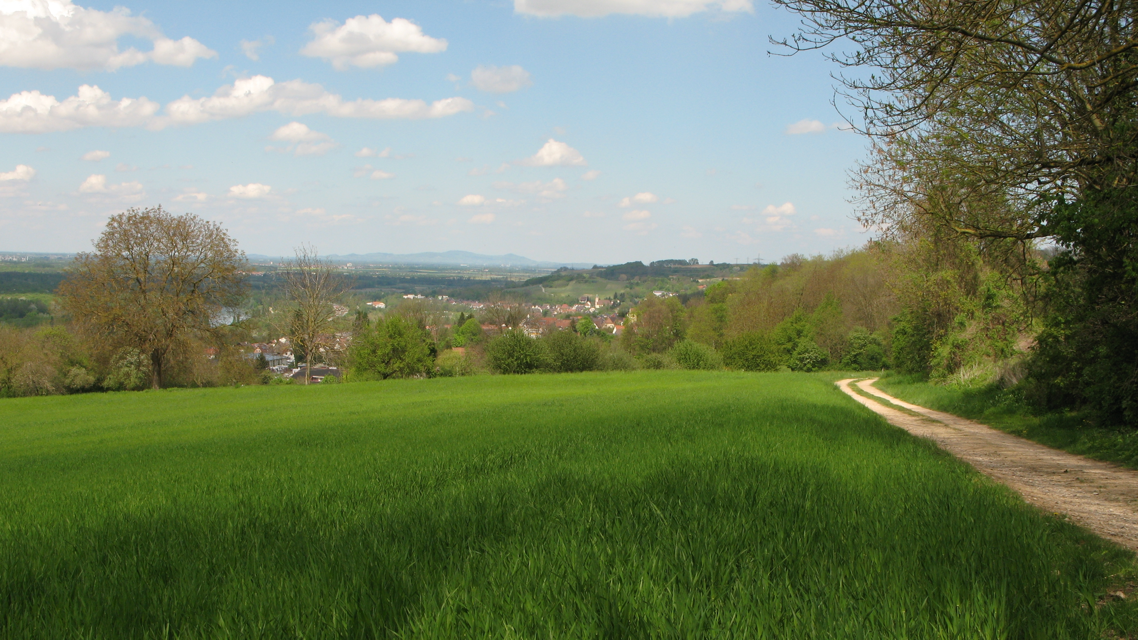 Am Stationenweg bei Bad Bellingen am Fernwanderweg Markgräfler Wiiwegli im Markgräflerland.